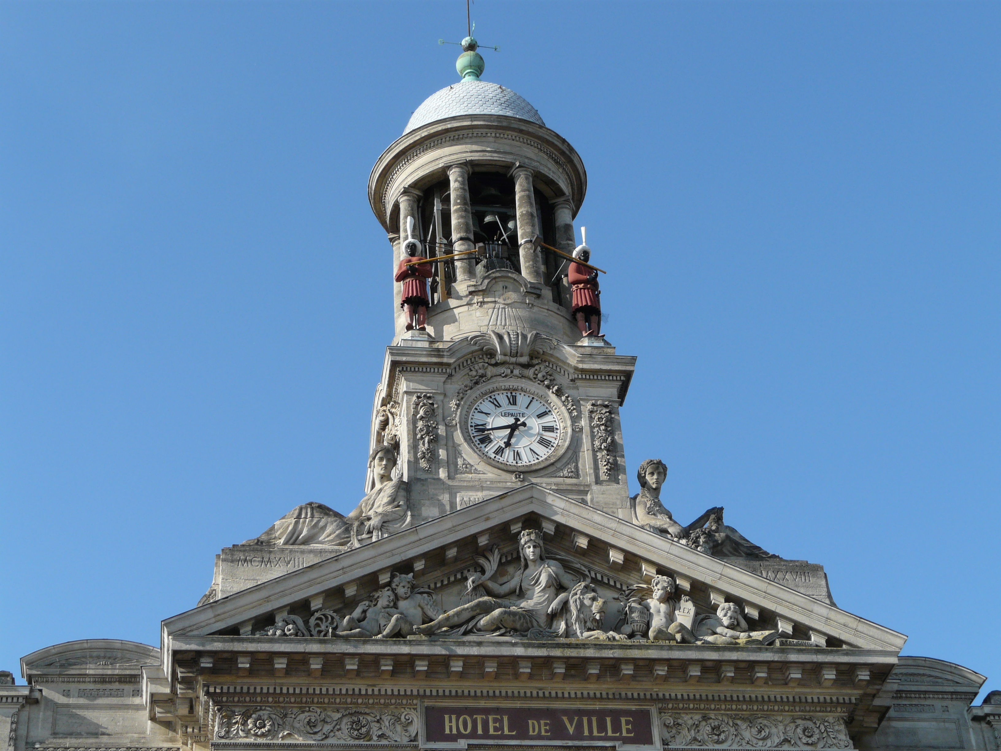 Le campanile de l'hôtel de ville de Cambrai avec ses deux jaquemarts, Martin et Martine, qui sonnent les heures. Le fronton est orné d'un haut relief d'Ernest-Eugène Hiolle.